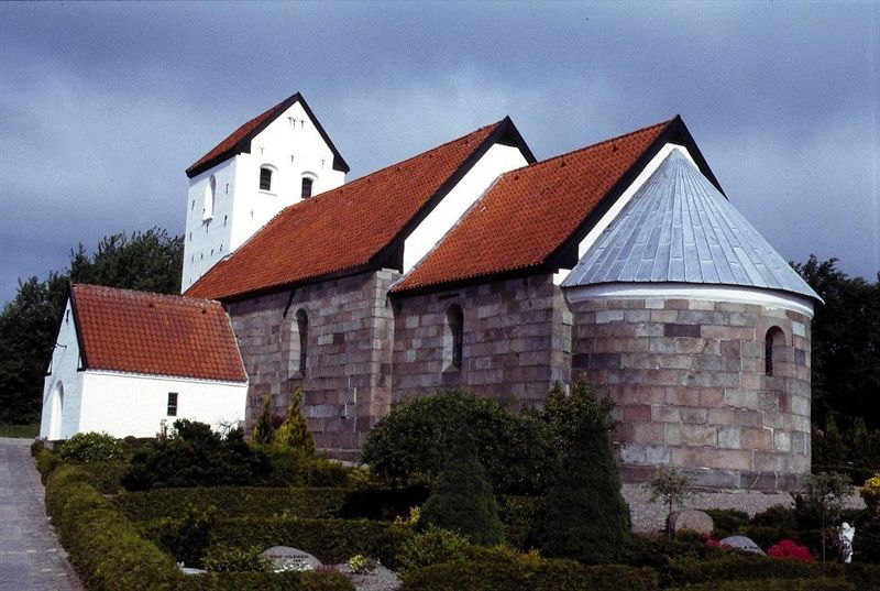 Svenstrup Kirke (Aalborg Kommune) i Danmark. Svenstrup kirke